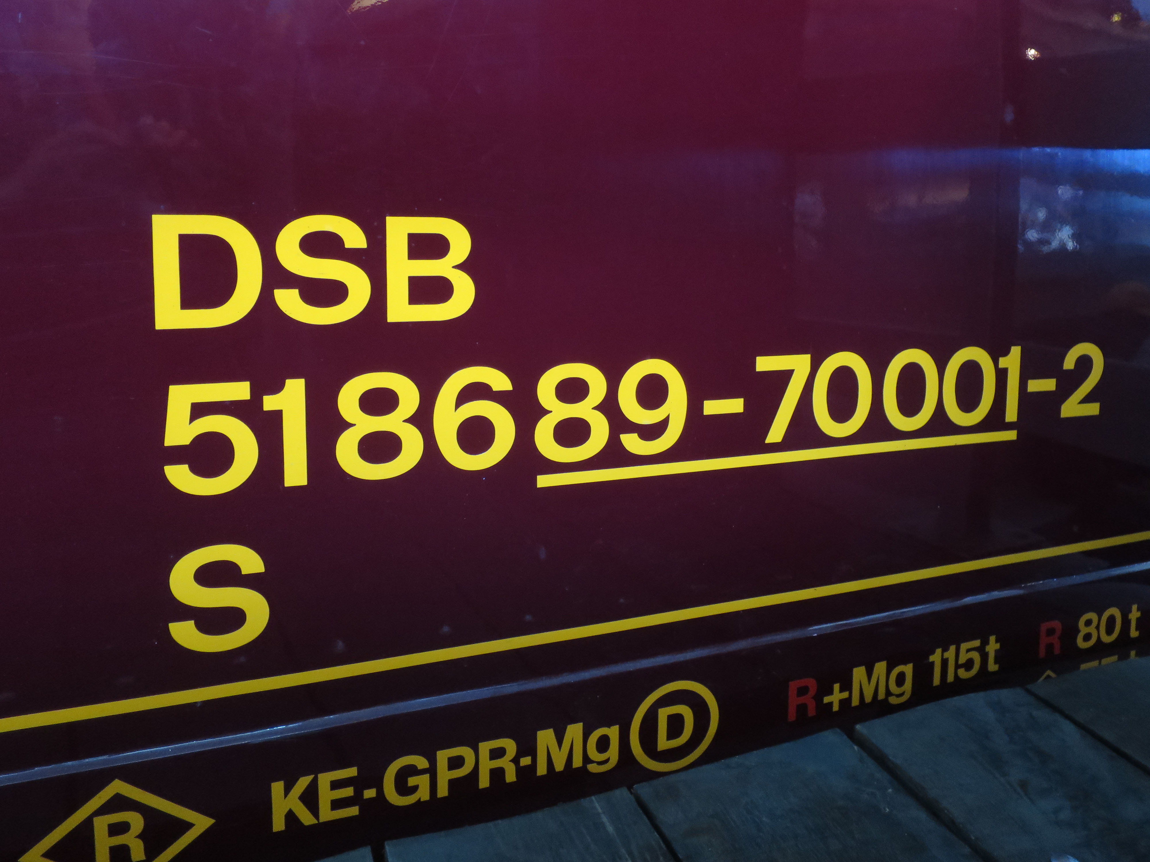 Betriebsnummer des Salonwagens 1